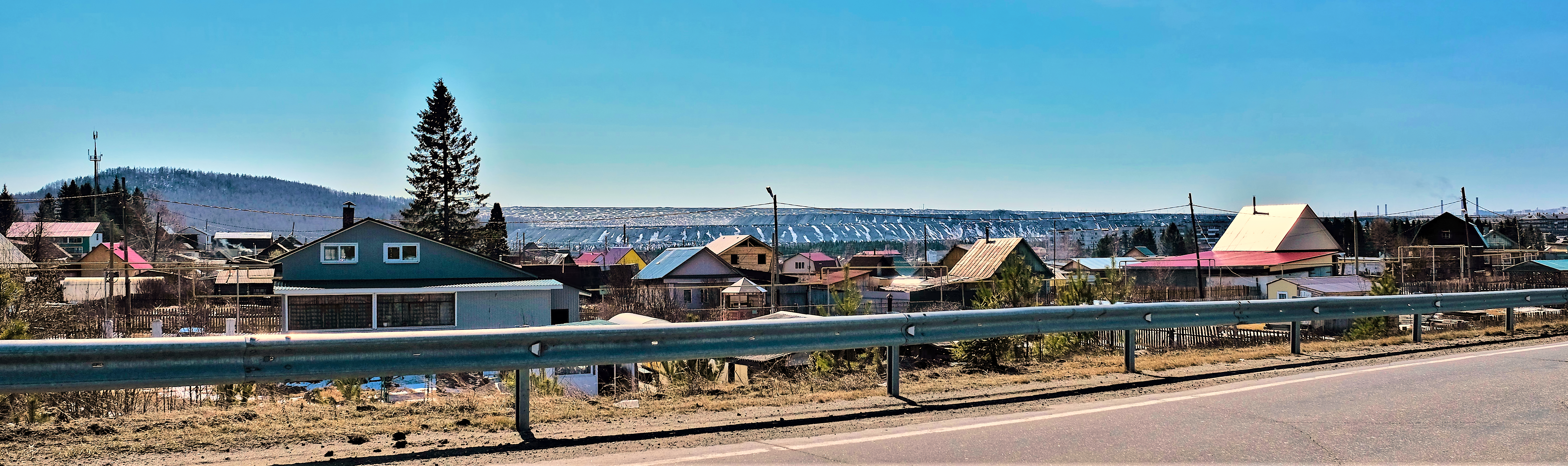 Вид на посёлок Валериановск (на заднем плане отвал пустой породы Качканарского ГОКа)